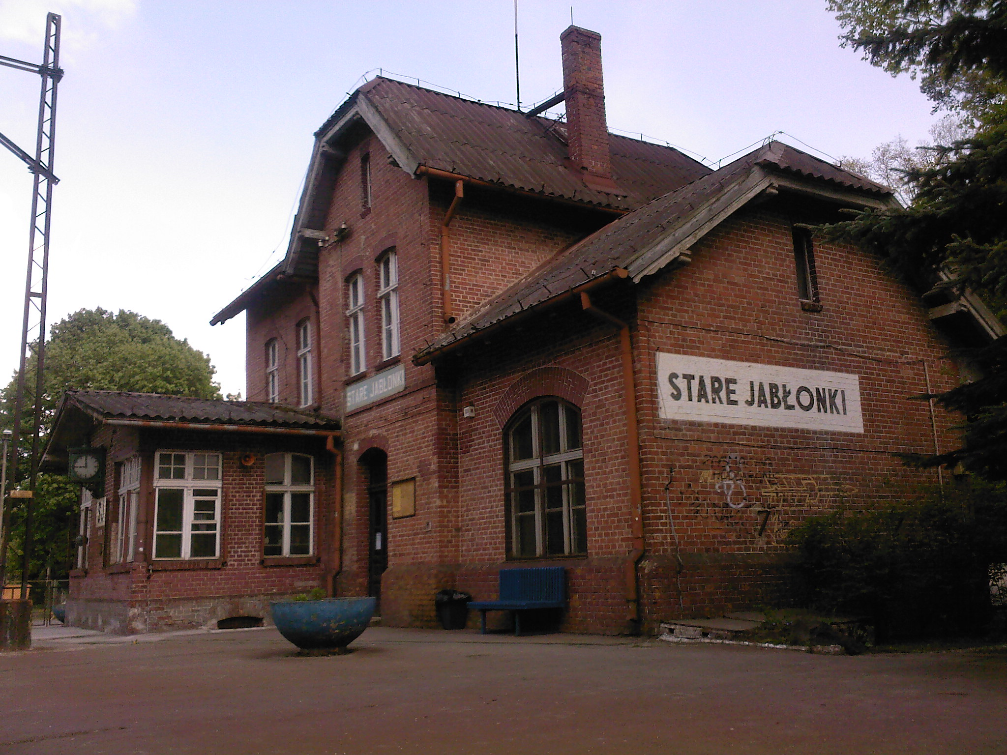 Stare Jabłonki, stacja kolejowa